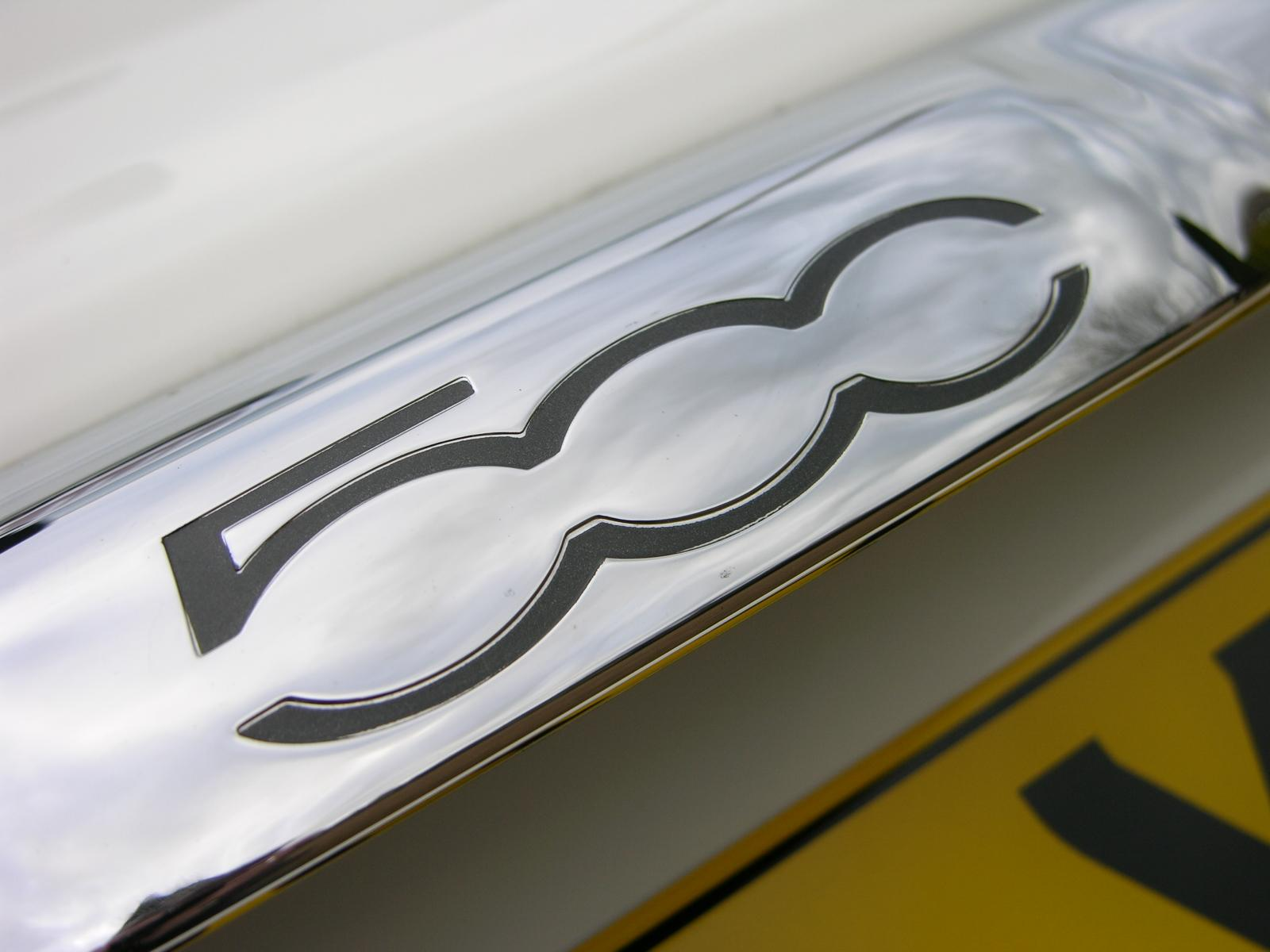 2008 FIAT 500 1.4 Lounge.